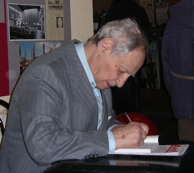 Der sowjetische Kulturoffizier und Hochschullehrer Wladimir Gall während einer Diskussionsrunde in Berlin-Weißensee.